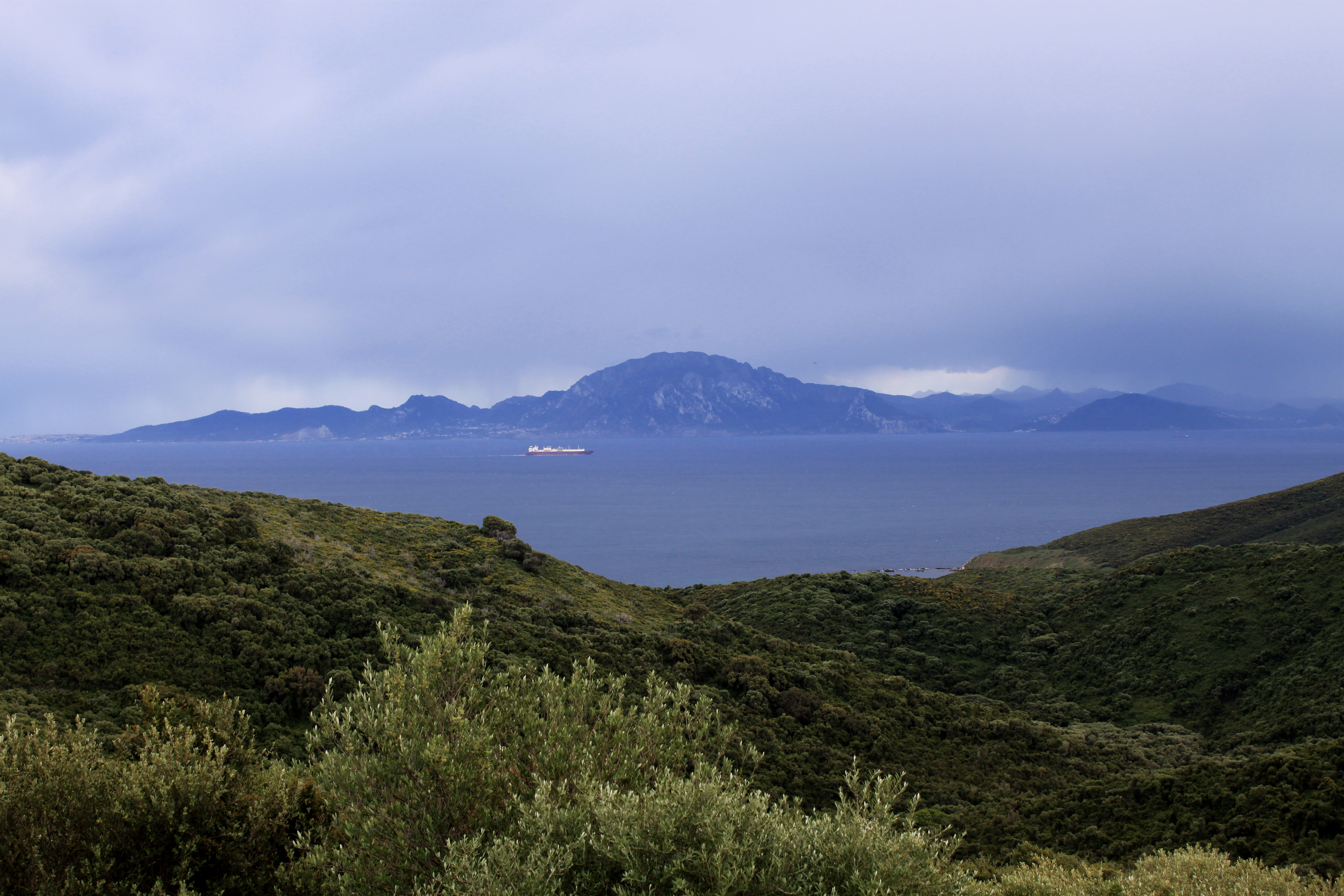 Vista del Estrecho de Gibraltar desde la costa de Algeciras. Se observa al fondo la costa africana con el monte Musa. En la costa europea a la izquierda el Cerro de la Horca, a la derecha el Cerro Centinela y entre ambos el valle del arroyo de Quiebrabotijos. Algeciras, Andalucía, España.